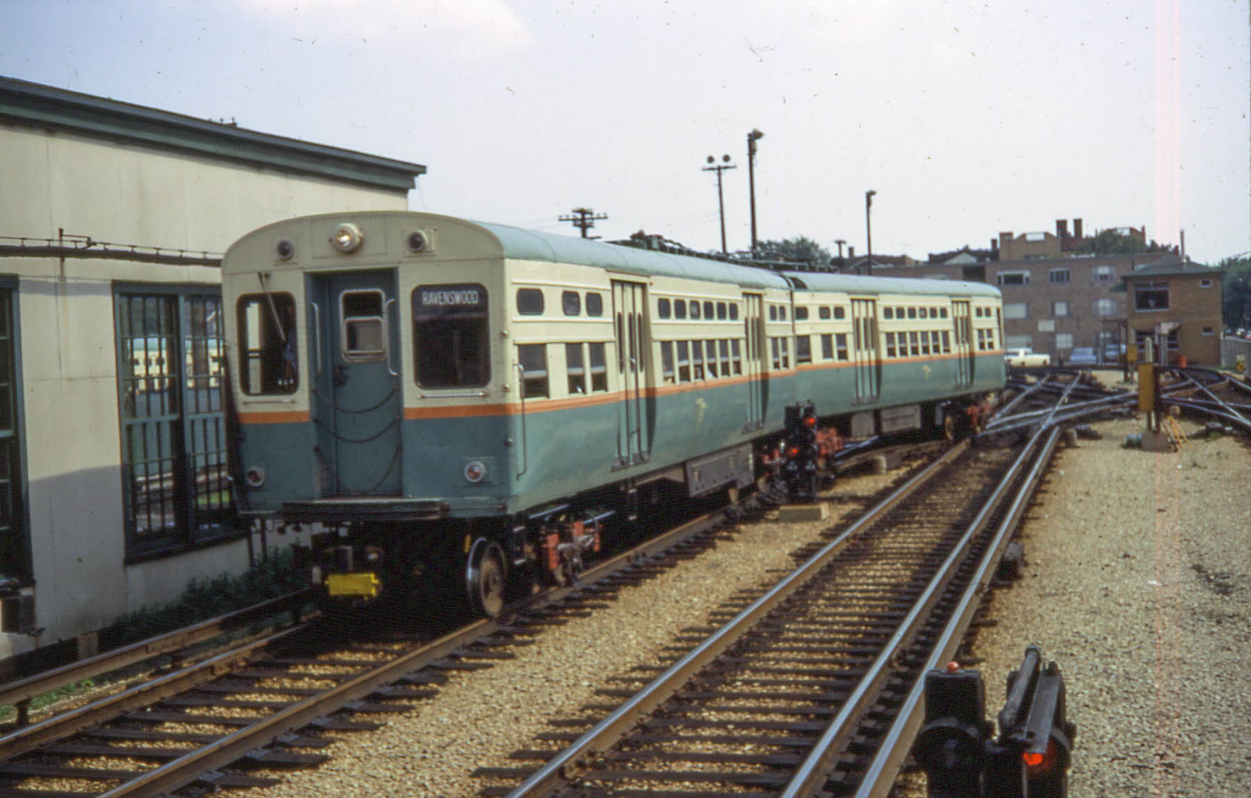 19670614 12 CTA 6127 Kimball Ave